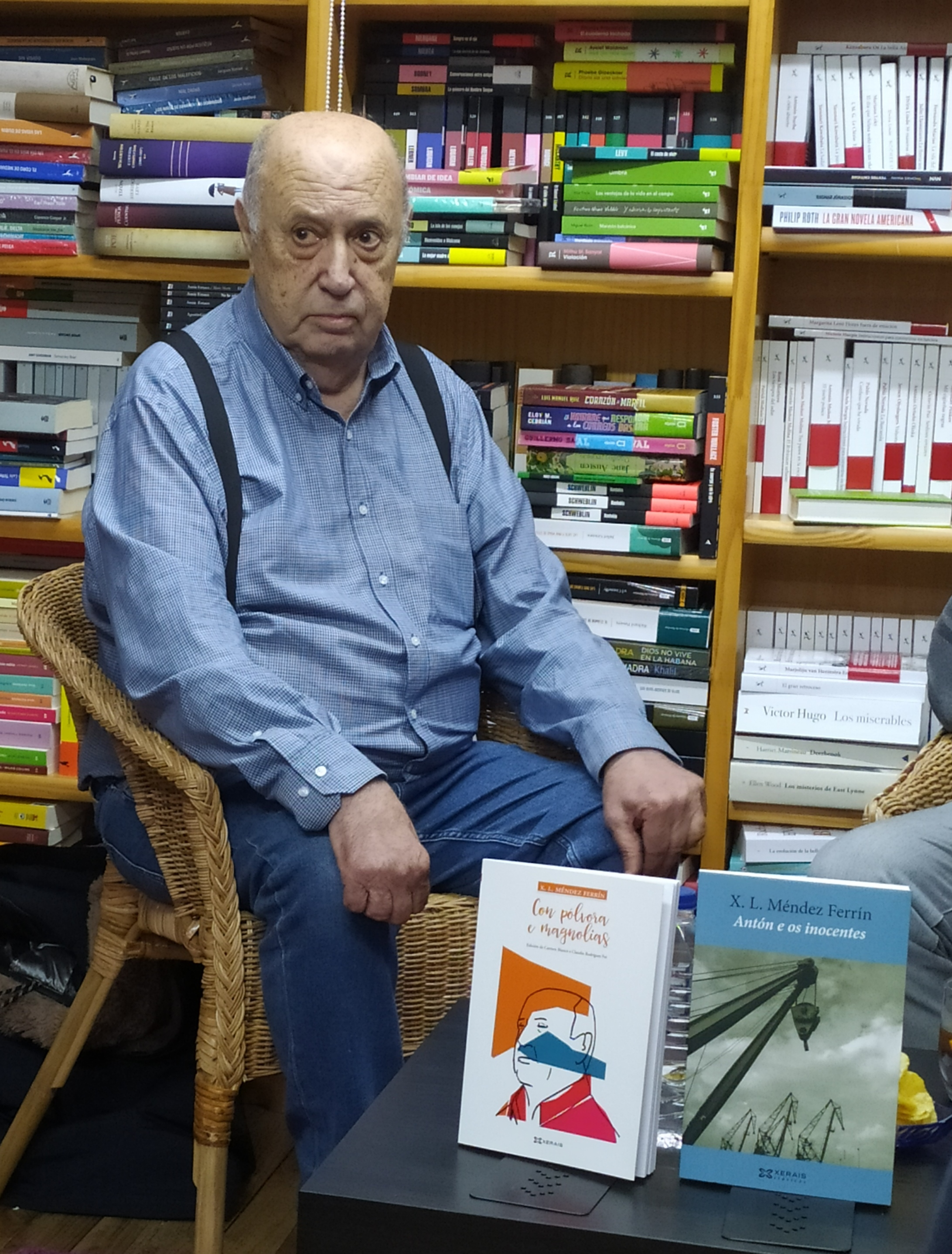 Xosé Luís Méndez Ferrín na Libraría Paz de Pontevedra en xaneiro de 2020